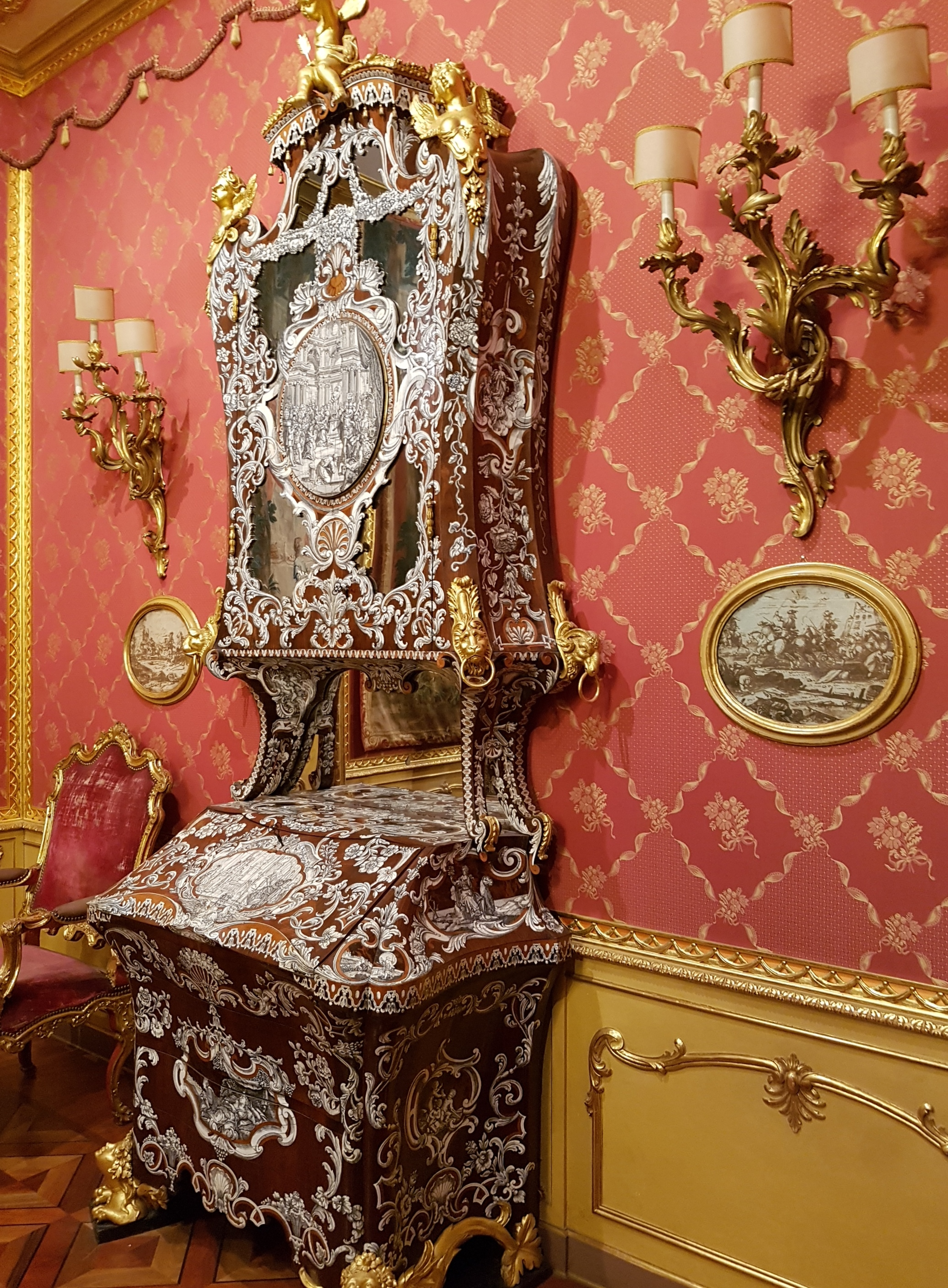 Il doppio corpo di Piffetti, Salone PIffetti, Museo di Arti Decorative Accorsi–Ometto, Torino